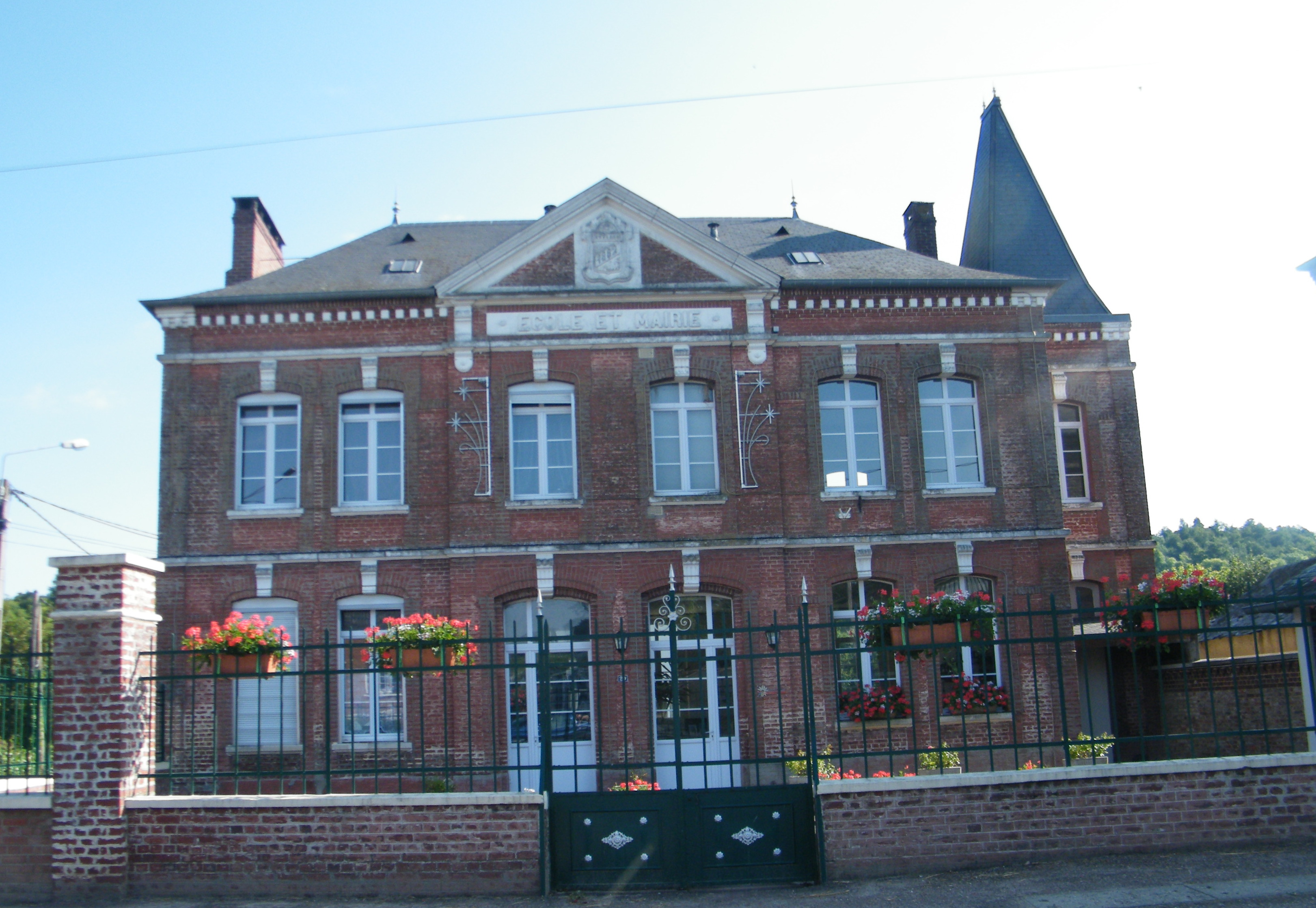 Le Quesne, Somme, France, mairie-école.